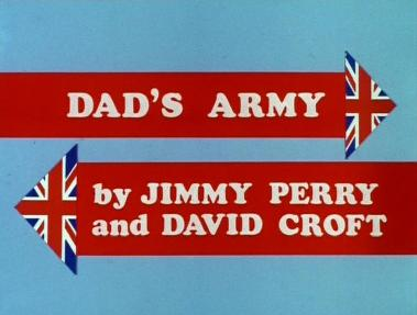 Dad's Army nyitókép